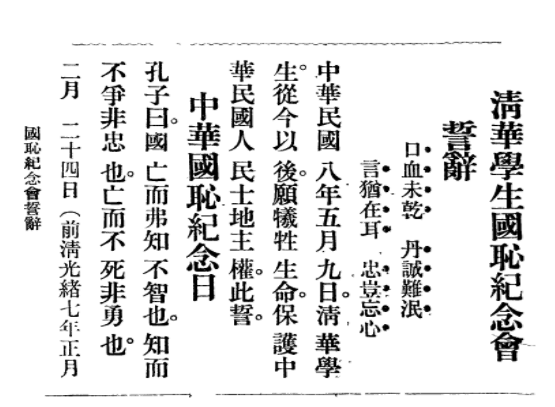 清華大學國恥紀念會誓詞